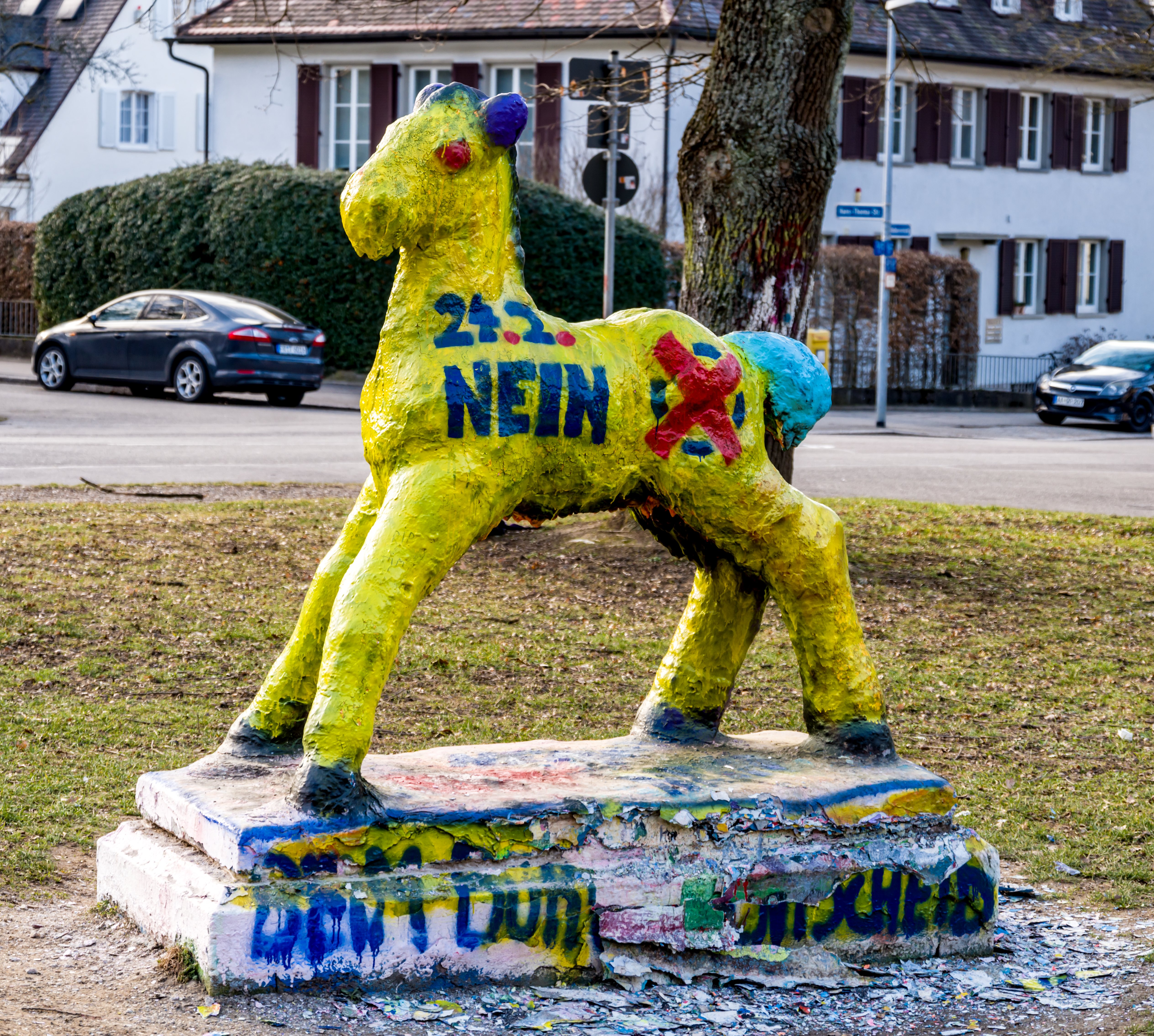 Bilder aus Freiburg im Breisgau Das Holbeinpferdle am 19.02.2019. Am 20.02.2019 geht es für 6 Wochen in die Restaurierung, dabei werden alle Farbschichten entfernt